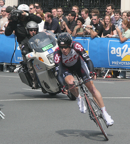 Stuart O'Grady